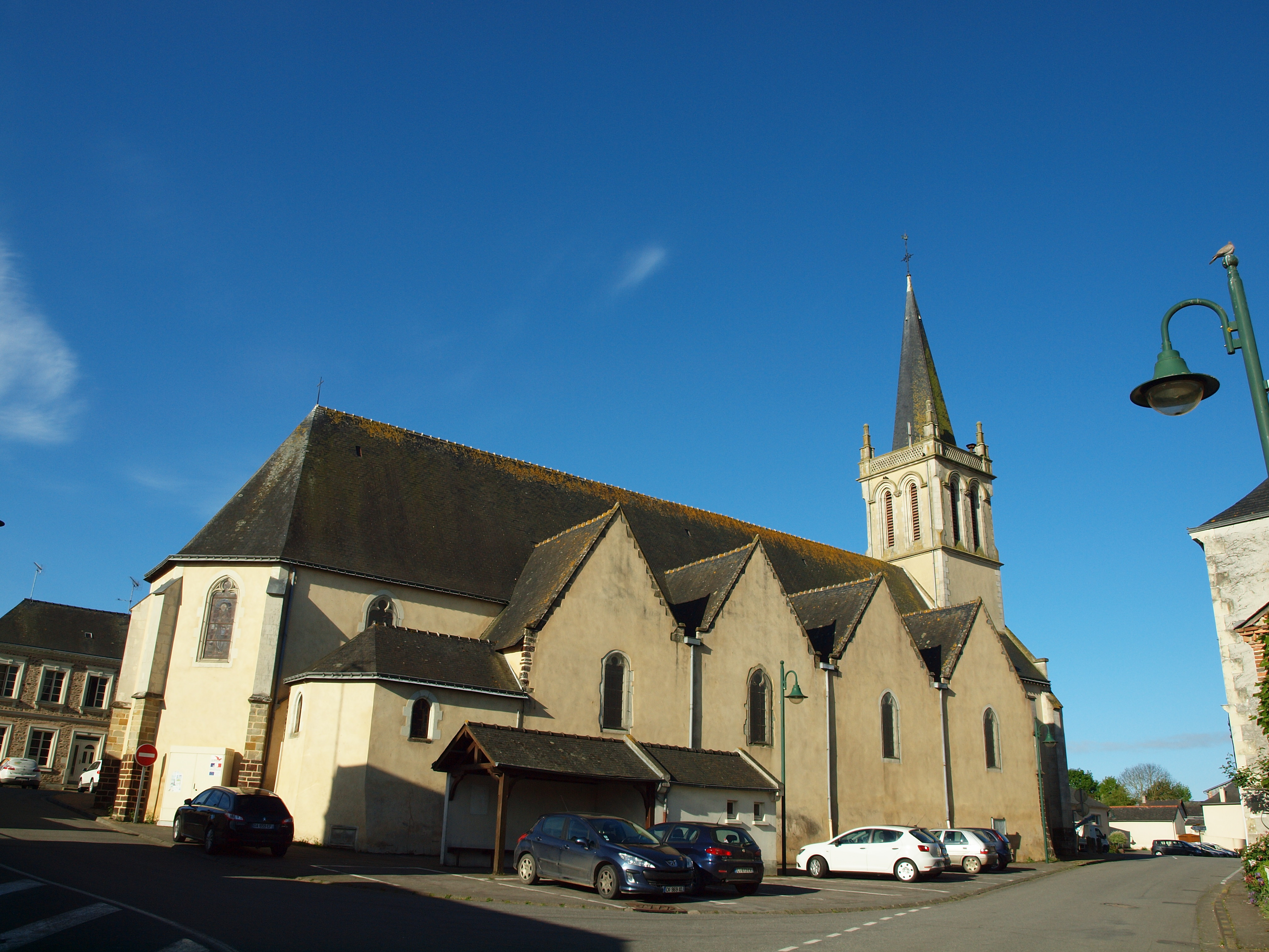 Ballots (Mayenne, France)